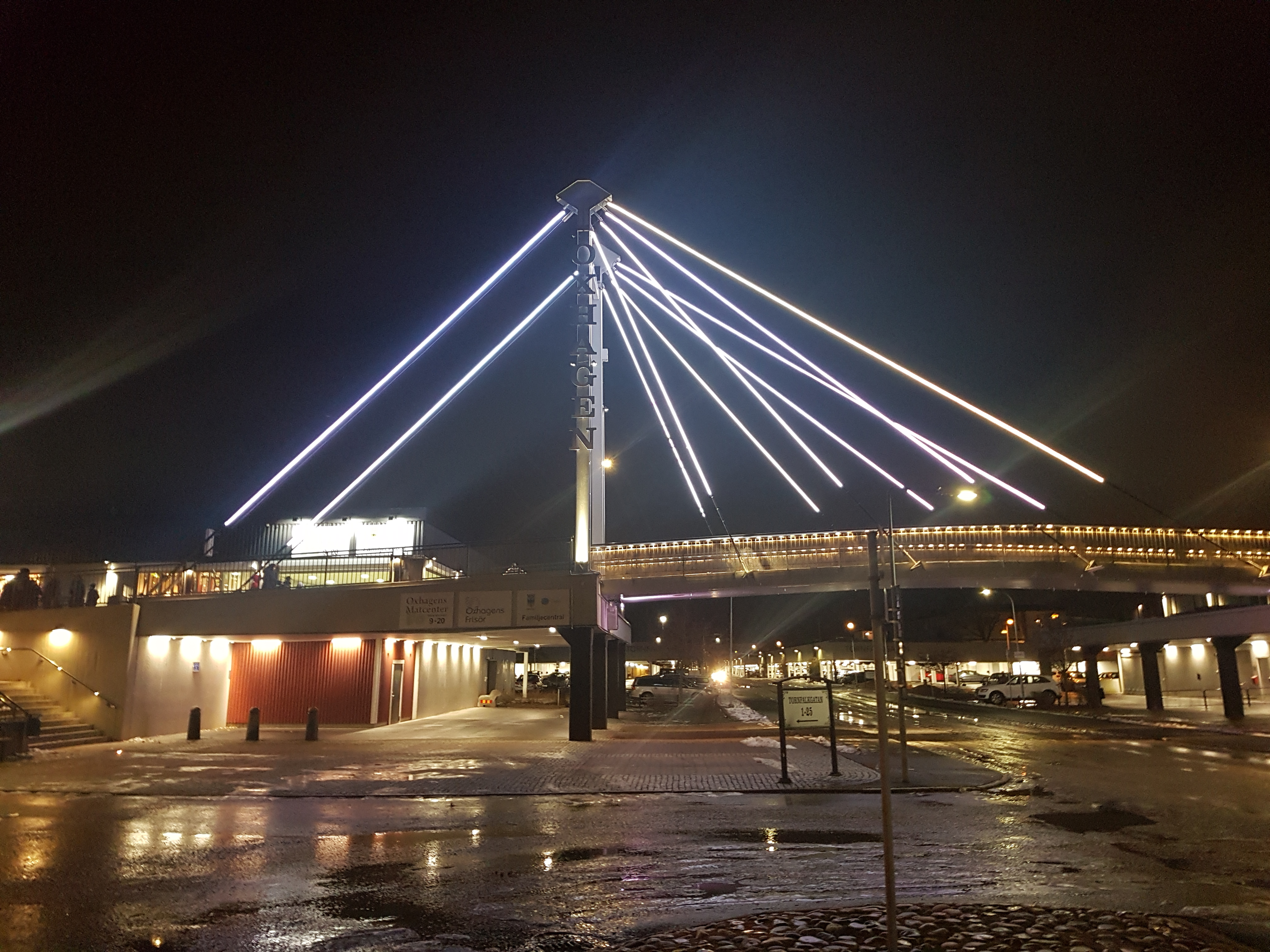 Bro över infart och parkering i Oxhagen